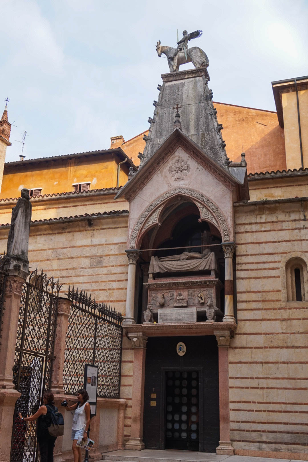 500px provided description: Santa Maria Antica [#italy ,#italia ,#verona]